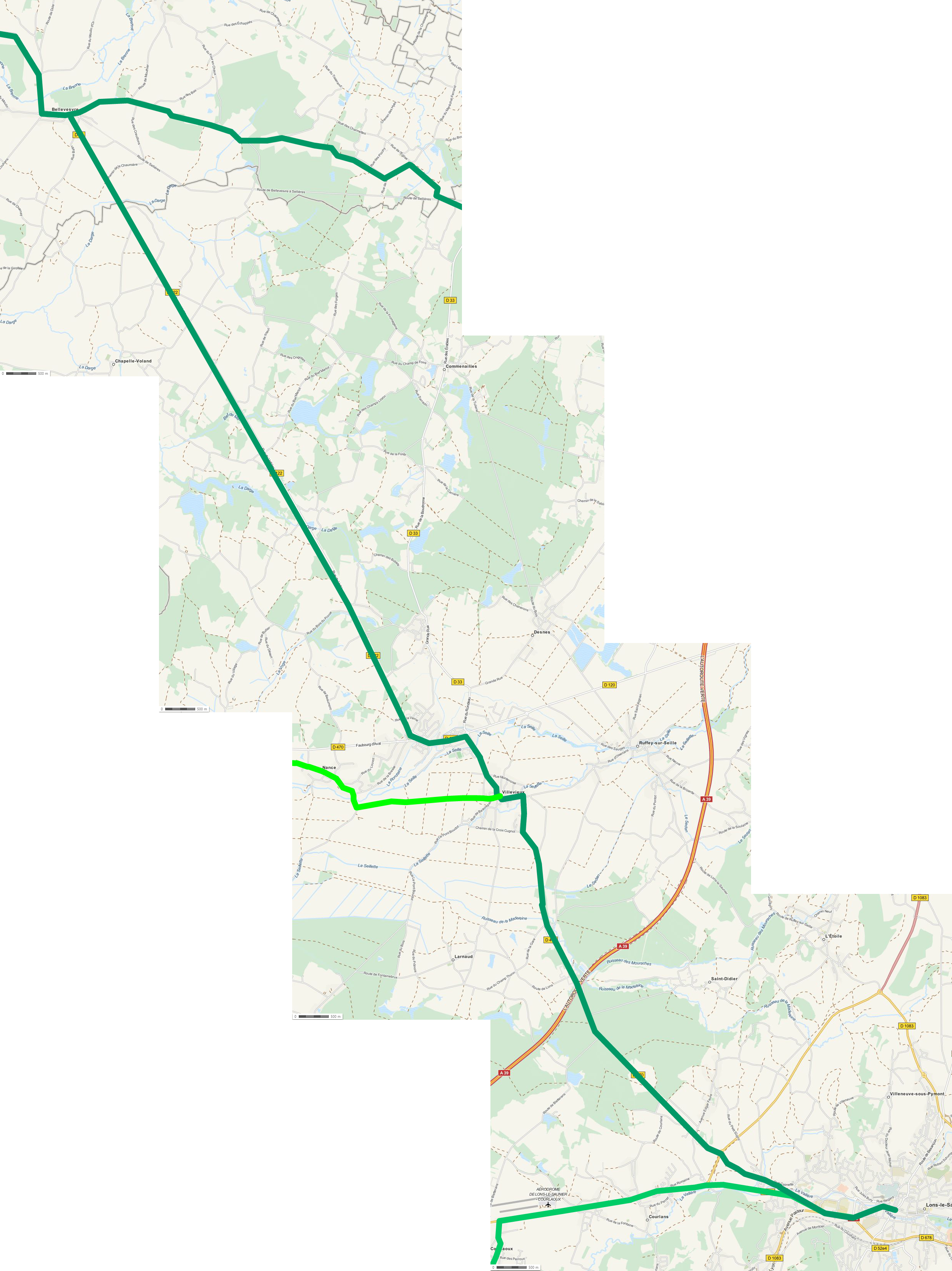 Karte der Römerstrasse von Bellevesvre nach Lons-le-Saunier Carte de la voie romaine de Bellevesvre à Lons-le-Saunier This map may be incomplete, and may contain errors. Don't rely solely on it for navigation.